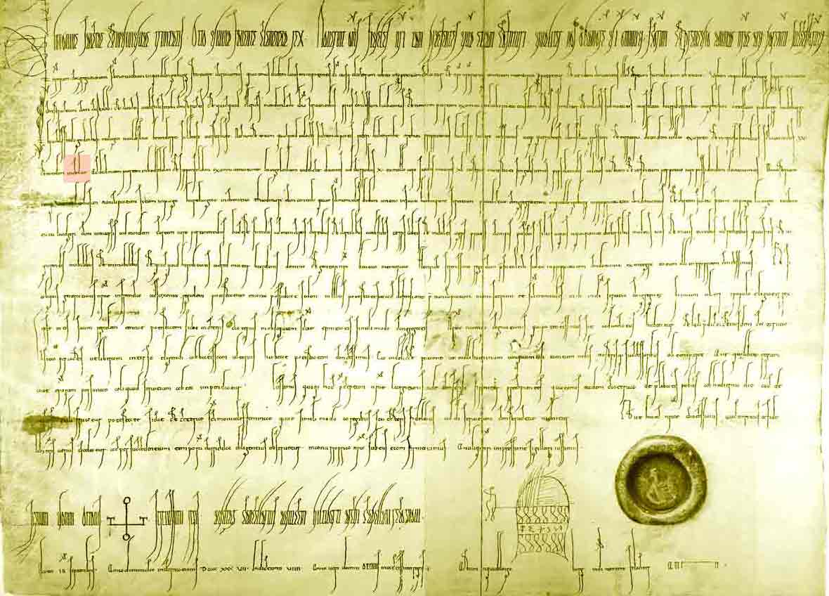 Urkunde von Otto I. in den Regesta Imperii vom 13. September 936, Reproduktion in Heimatstube Calbe/S. Die Urkunde enthält die Ersterwähnung der Stadt Calbe und der Gemeinden Großmühlingen, Harkerode, Heudeber, Rieder und Westerhüsen.